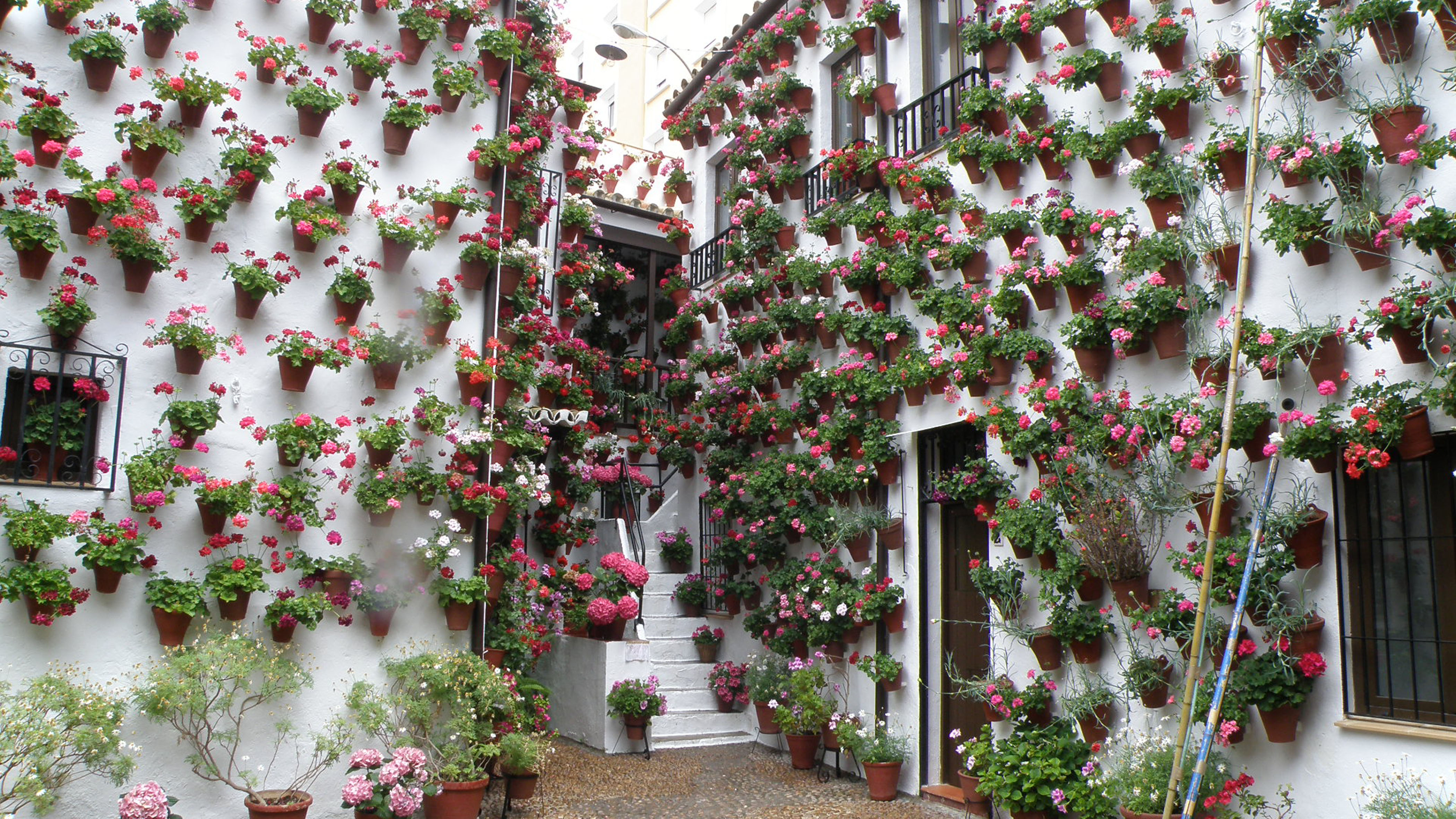 Patio de Córdoba (España).